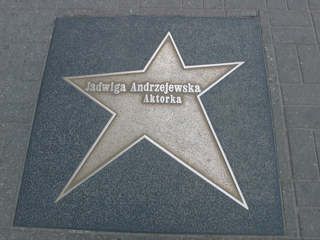 Łódź Walk of Fame - Jadwiga Andrzejewska